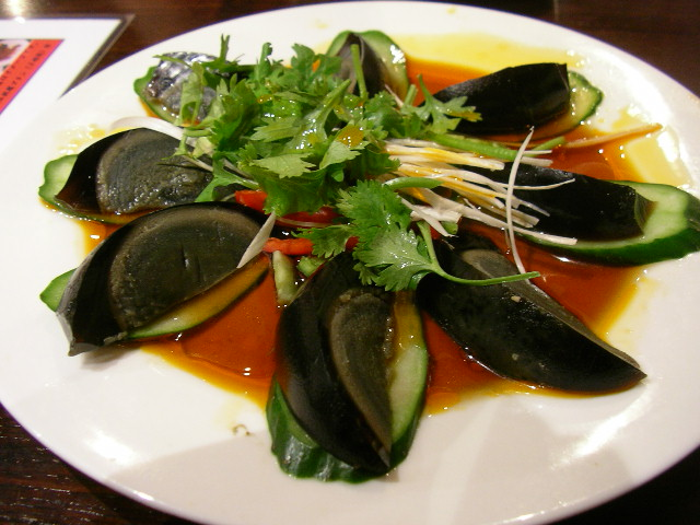 皮蛋のキュウリ添え（東京・中央区銀座3-12-1、東銀座駅最寄りの「西安料理 刀削麺園」）@Toshomen En (刀削麺園)